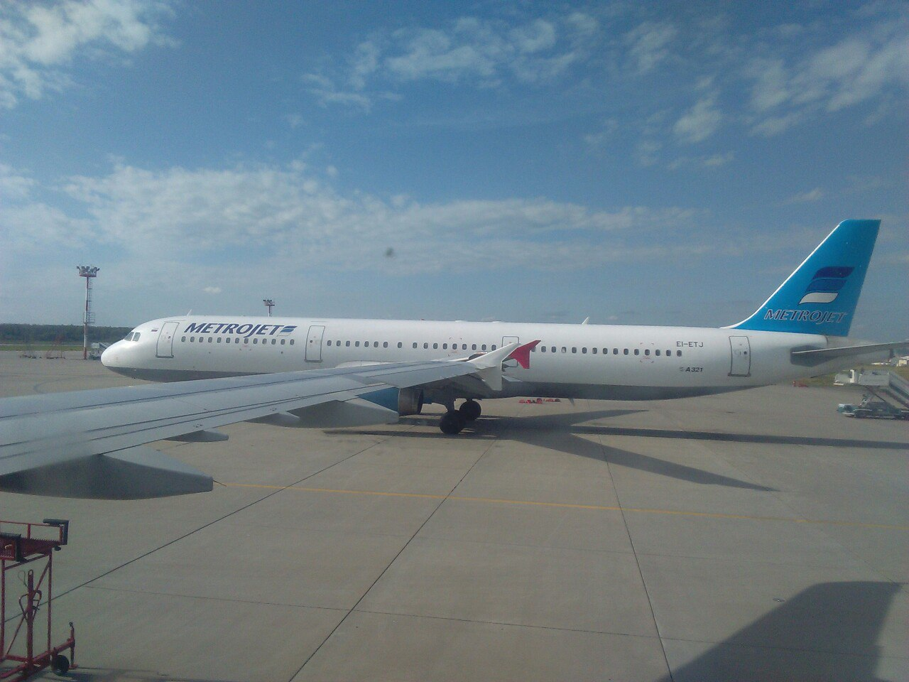 A321 номер EI-ETJ в аэропорту Домодедово 15.09.2015